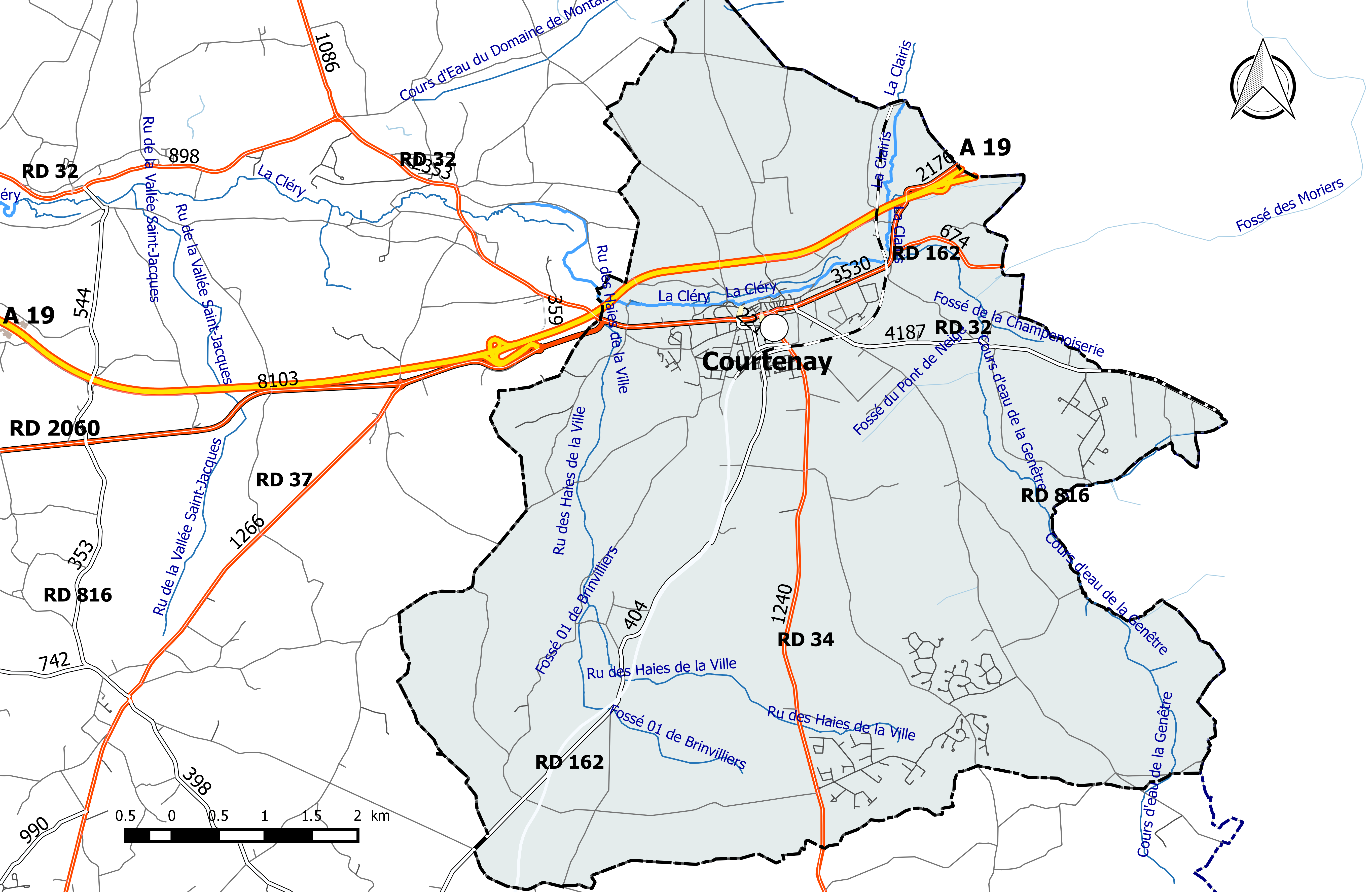 Carte du réseau routier de la commune de Courtenay (Loiret).